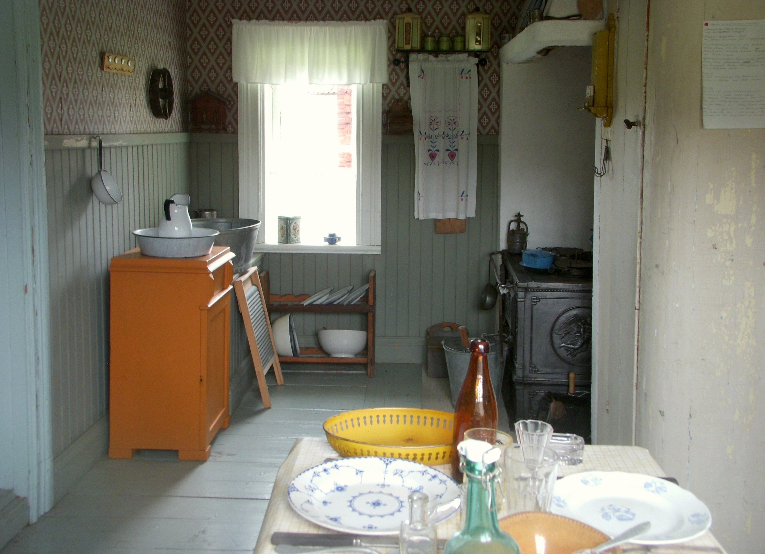 Ludvika Gammelgård, gruvarbetarbostad